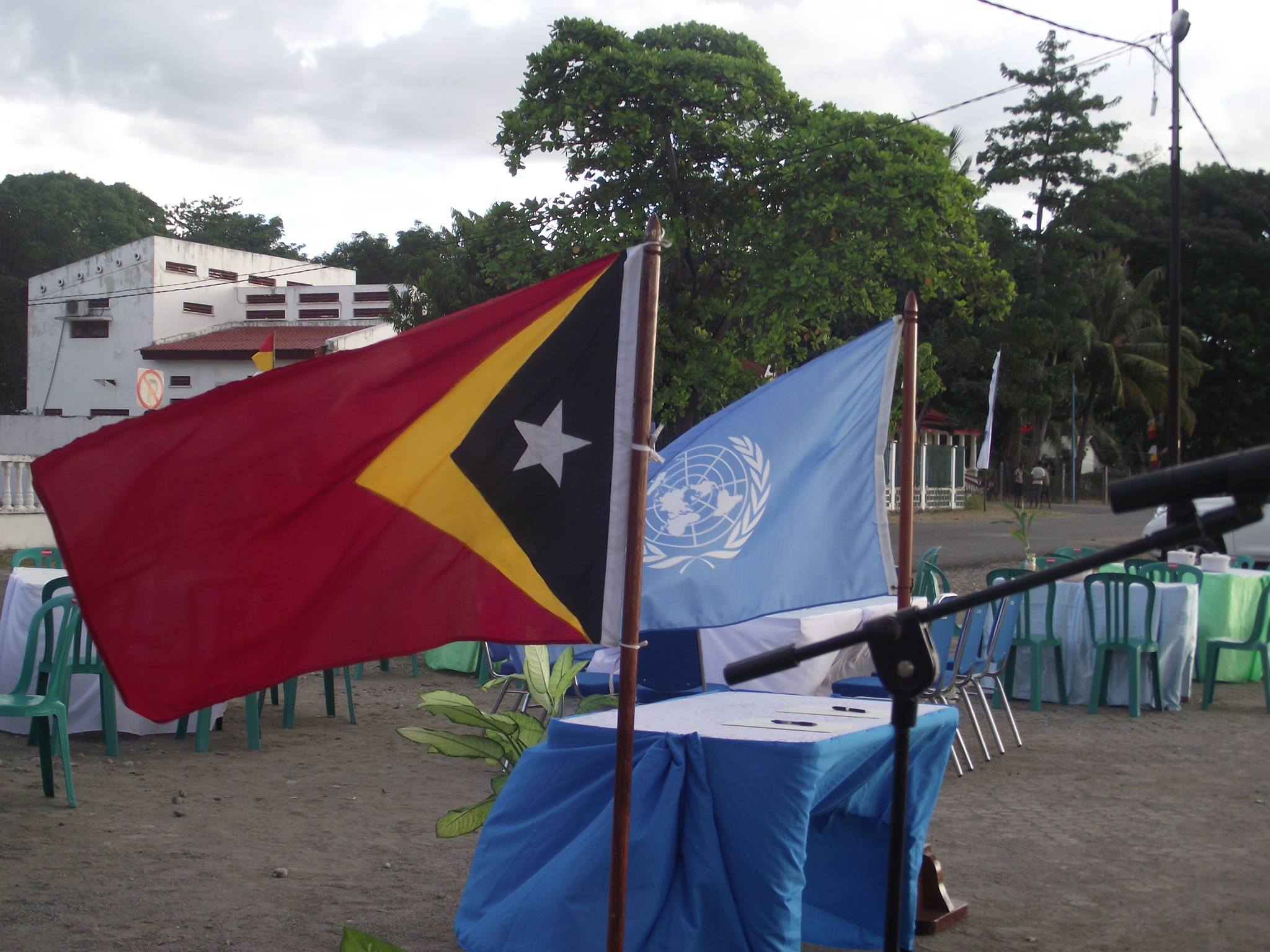 Sitz des Administrators in Oecusse